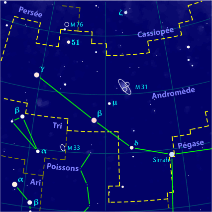 Carte pour la constellation Andromède produite à l'aide du logiciel PP3